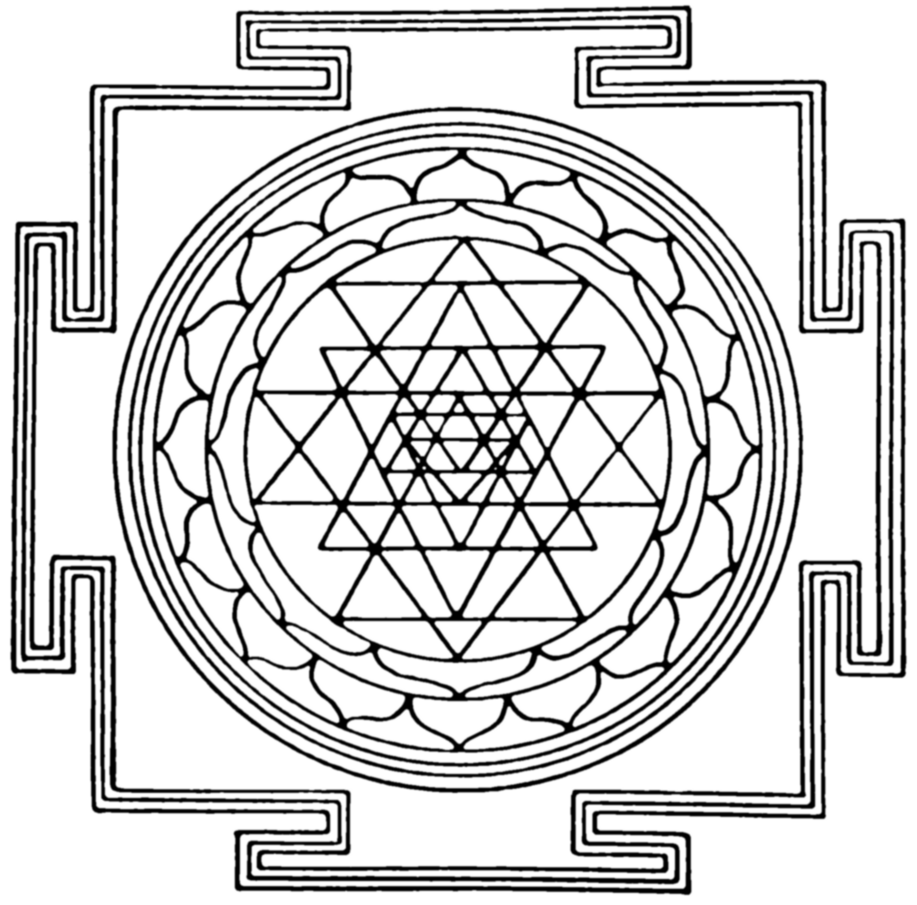 Sri-Yantra B/W picture